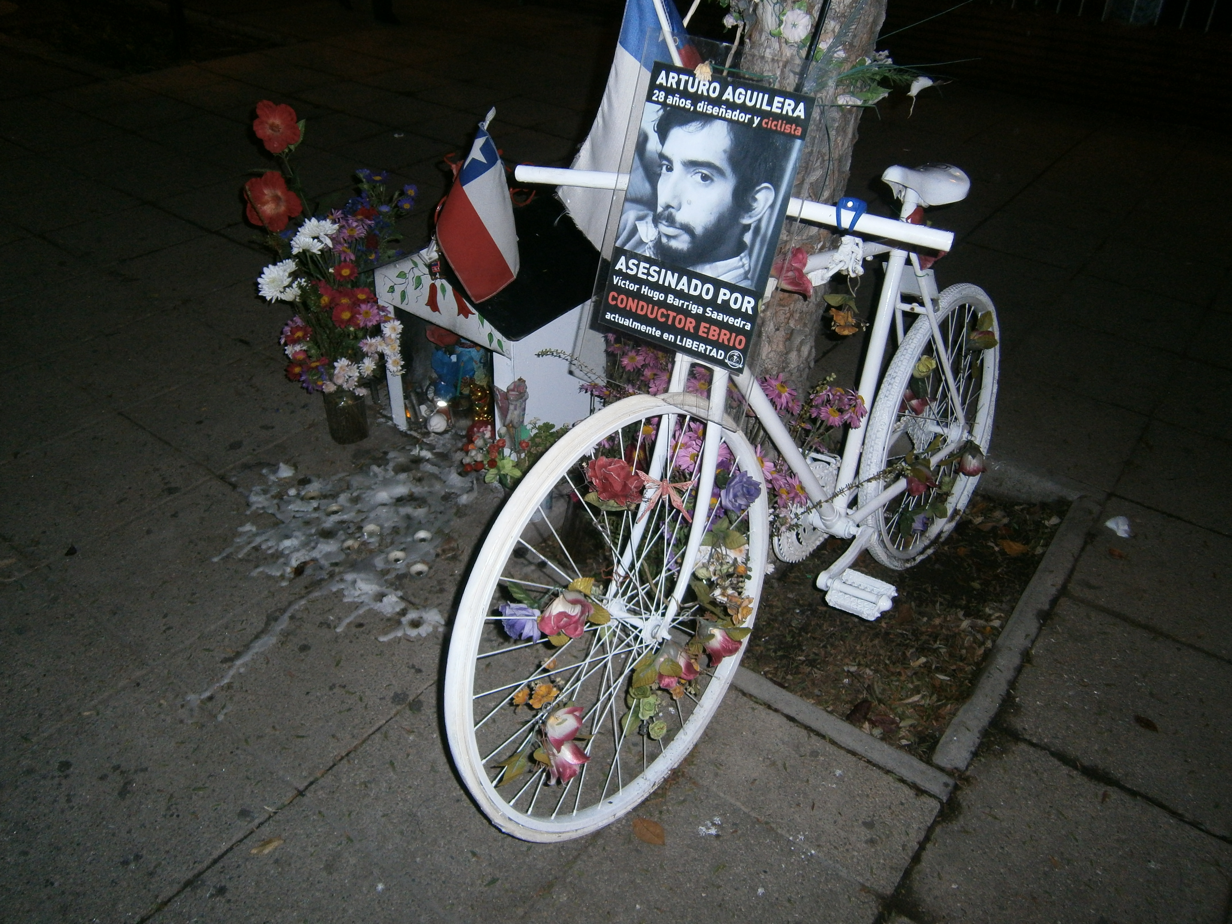 Animita con una bicicleta pintada de blanco para conmemorar la muerte de Arturo Aguilera, ciclista atropellado en la esquina de Santa Isabel con Bustamante en Santiago de Chile.